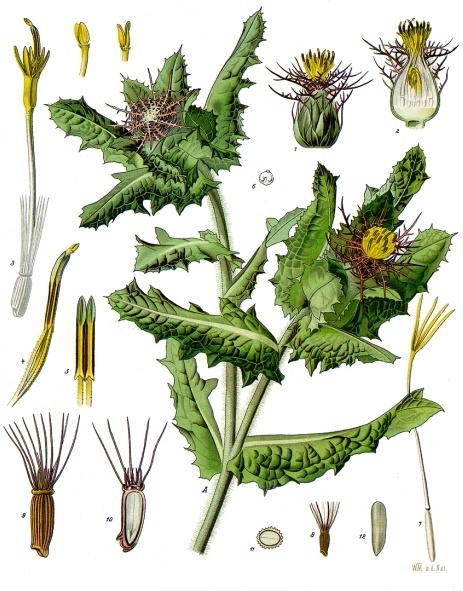 Benediktenkraut. A oberer Theil der Pflanze in natürl. Grösse; 1 Blüthenkopf von der Hülle befreit, desgl.; 2 derselbe im Längsschnitt, desgl.; 3 Scheibenblüthe, vergrössert; 4 Staubgefäss mit Griffel, desgl.; 5 Staubgefässe, desgl.; 6 Pollenkorn unter Wasser, desgl.; 7 geschlechtslose Randblüthe; 8 Frucht mit Pappus, natürl. Grösse; 9 dieselbe, vergrössert; 10 dieselbe im Längsschnitt, desgl.; 11 dieselbe im Querschnitt, desgl.; 12 Same, desgl.